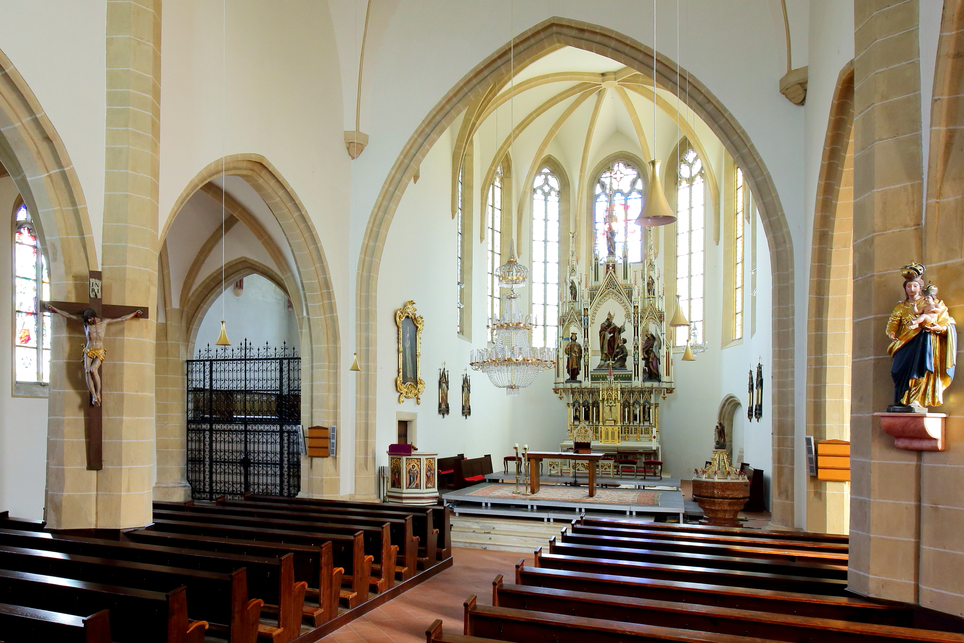 Innenansicht Richtung Chor der röm.-kath. Pfarrkirche hl. Valentin in der niederösterreichischen Marktgemeinde Großrußbach.Die dreischiffige, dreijochige Staffelkirche wurde in der 2. Hälfte des 15. Jahrhunderts errichtet und hat ein wesentlich höheres Mittelschiff.